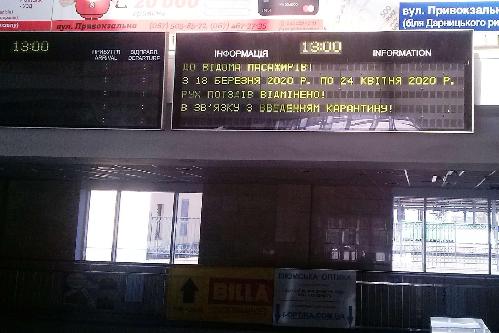 Объявление на станции Дарница о прекращении движения поездов